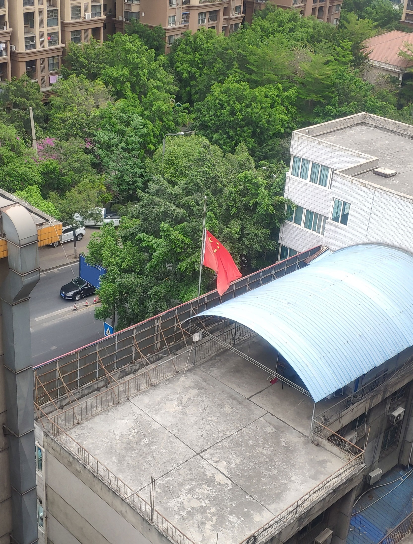 2020年4月4日，国旗下半旗致哀，摄于四川